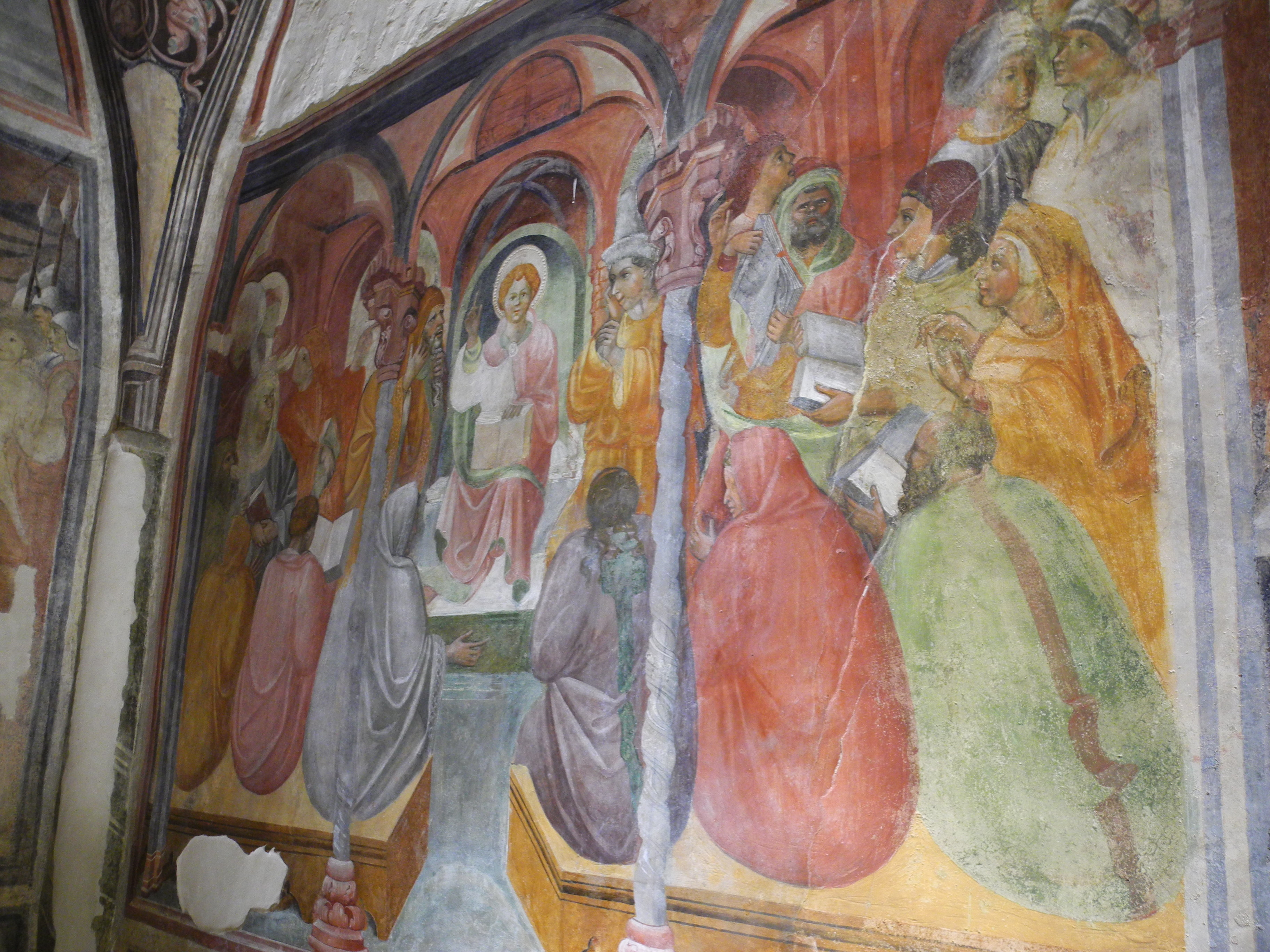 DISPUTA CON I DOTTORI-SEC. XV- PIEDIMONTE MATESE